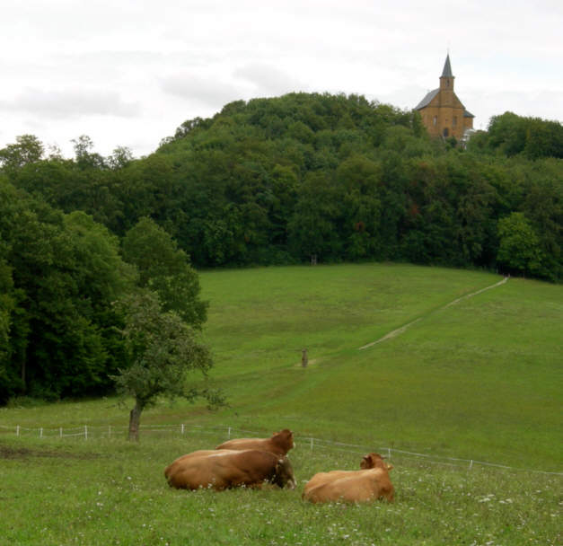 Frankenweg mit Wallfahrtskirche Gügel im Hintergrund.